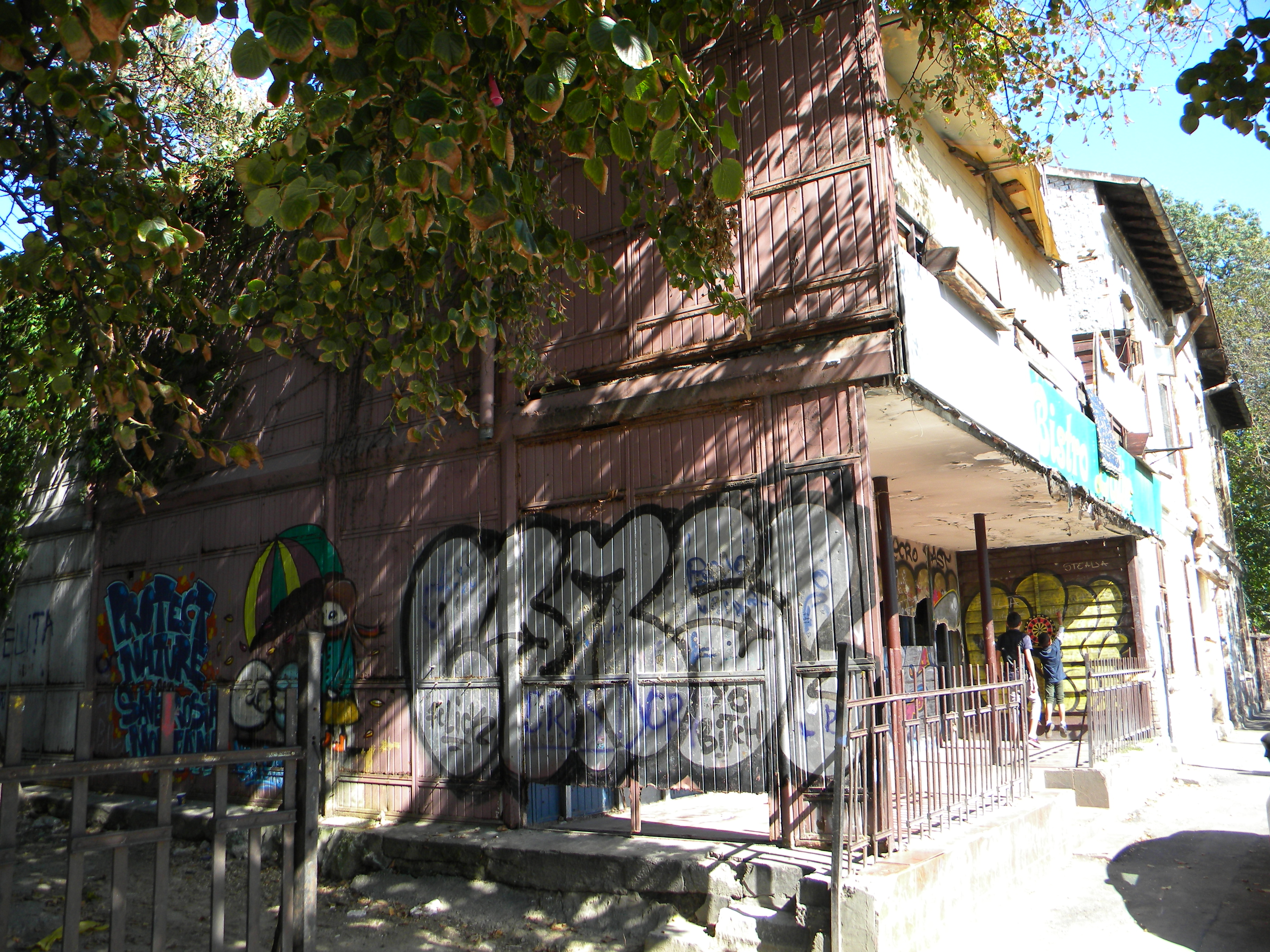 Bucuresti, Romania, Splaiul Independentei nr. 74 (Casa Pompiliu Eliade); B-II-m-B-21056 (2)